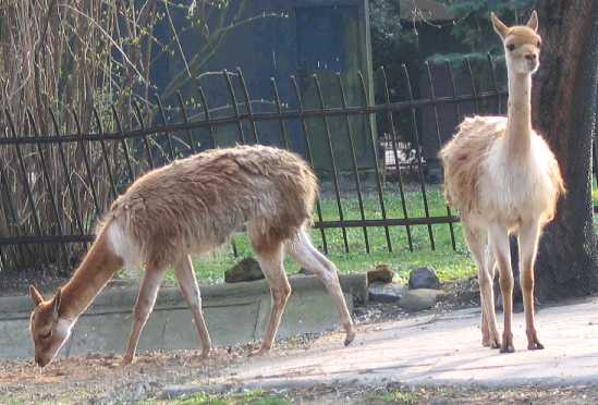 Vicugna vicugna